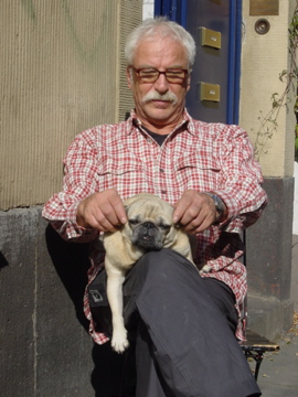 Diter Frowein genießt mit Mops die Sonne vor seinem Laden